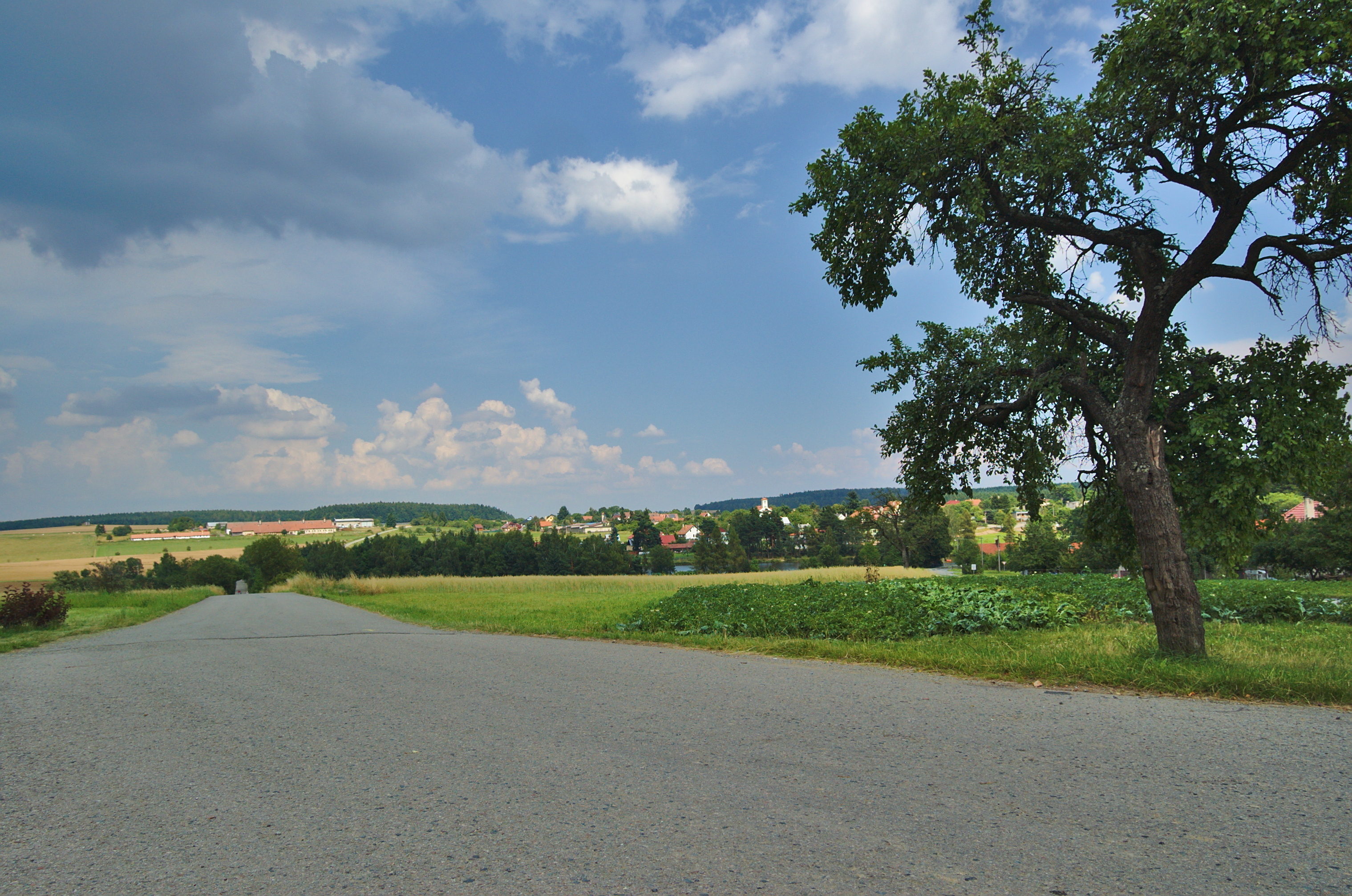 Pohled na Molenburk z Houska, Vysočany, okres Blansko